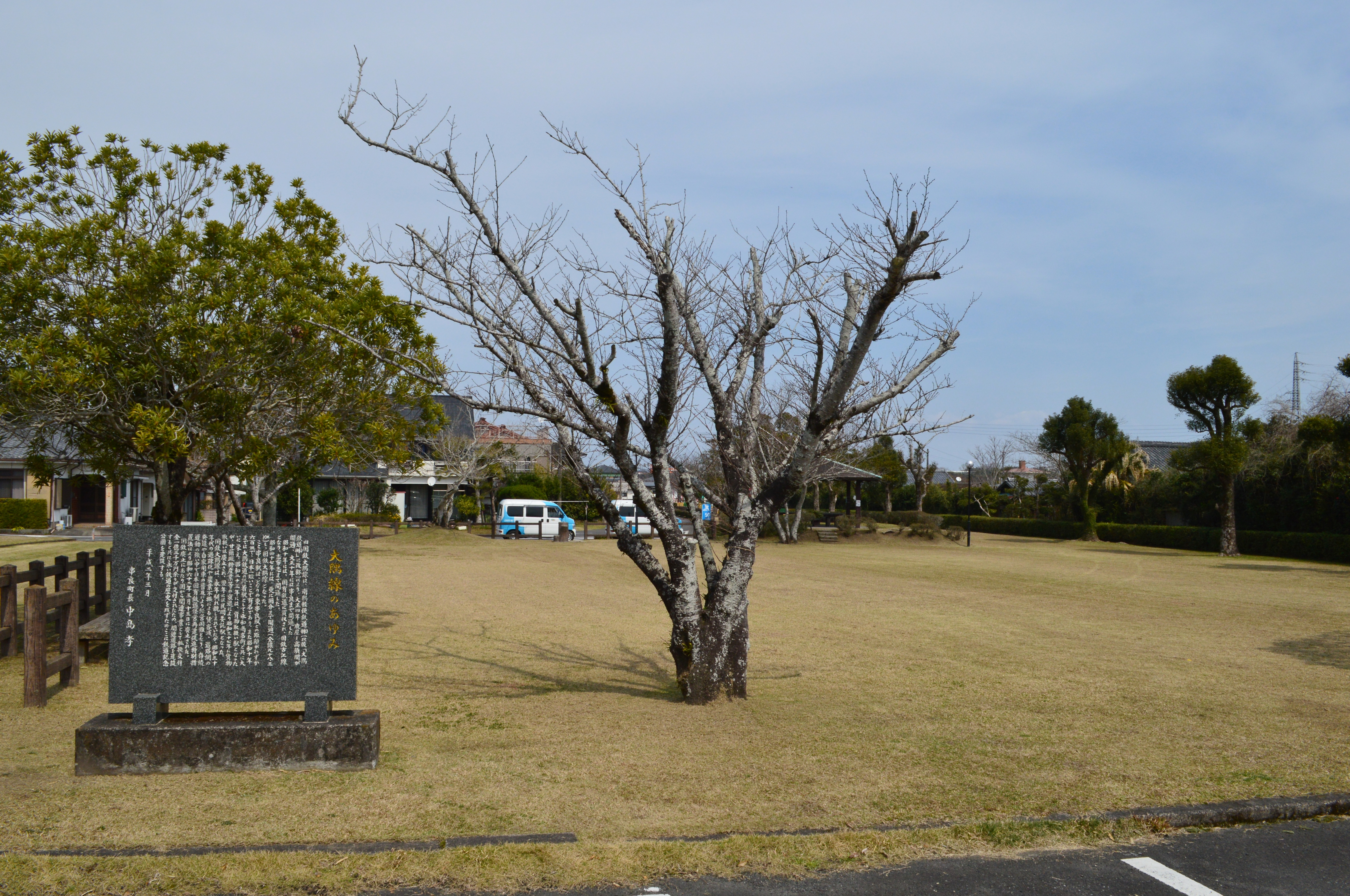 串良駅跡 概観